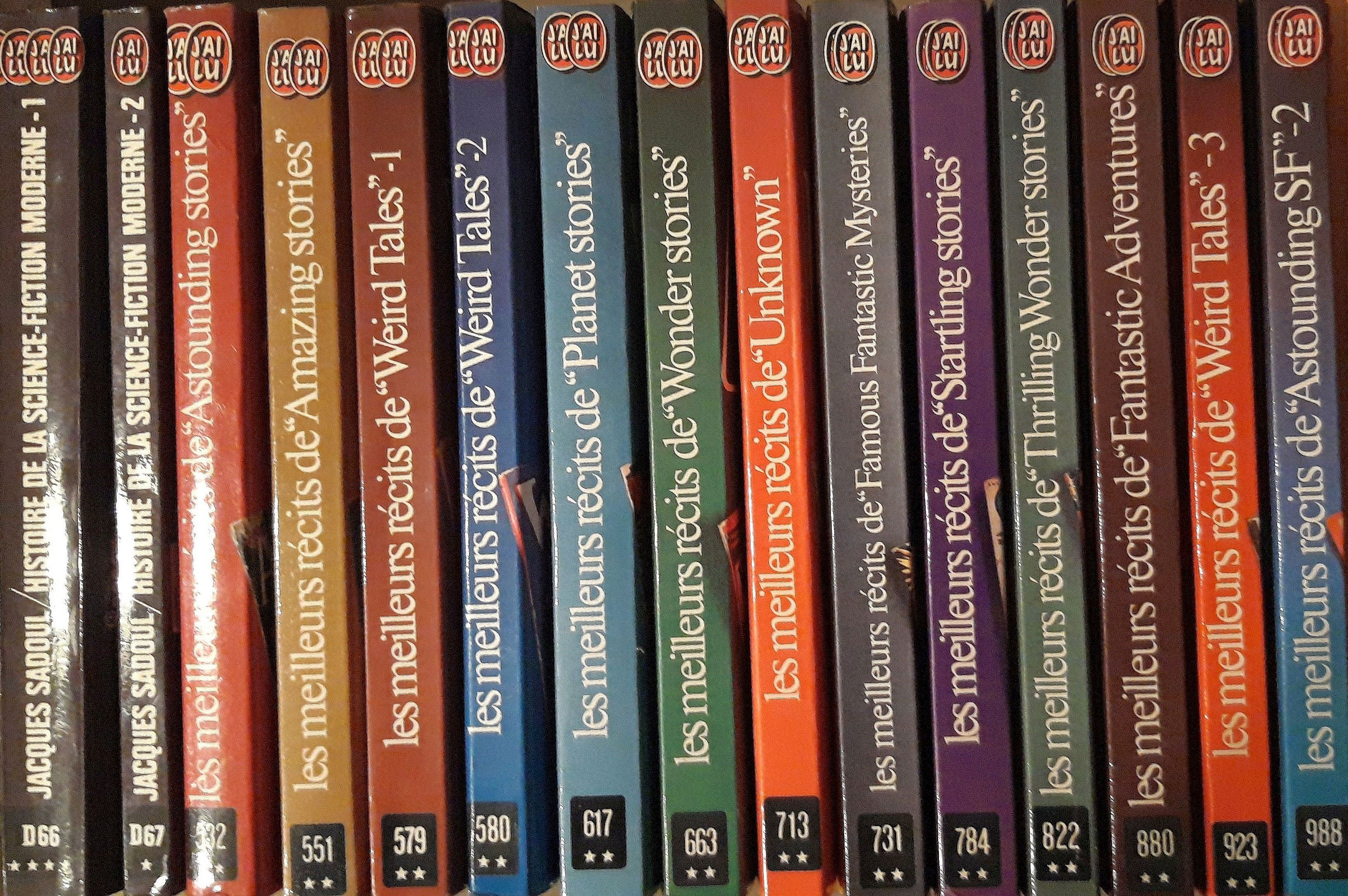 Les meilleurs récits de (Jacques Sadoul).